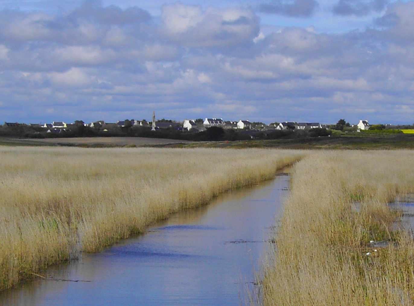 Vue lointaine de Plovan (au premier plan, les marais maritimes en bordure de la Baie d'Audierne)